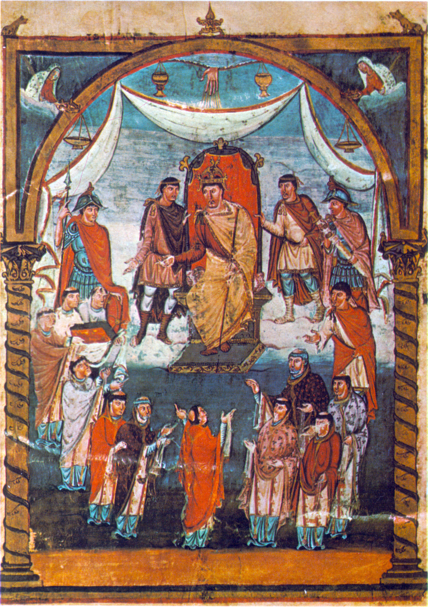 De Charel de Plakapp empfänkt eng Delegatioun vu Pateren aus dem Klouschter Tours.